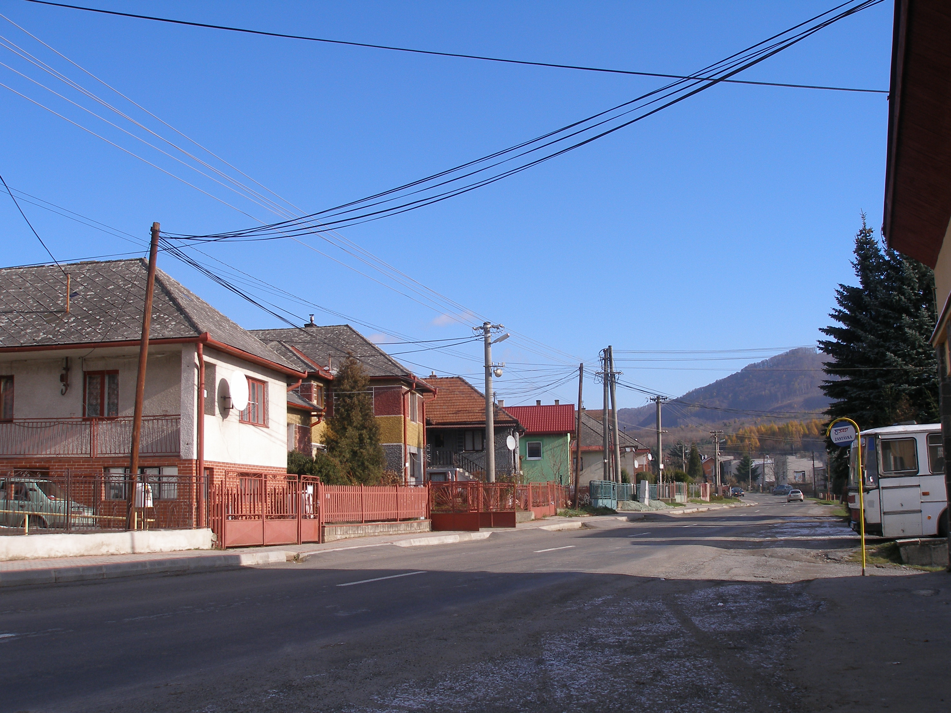 Obec Kokošovce v okrese Prešov